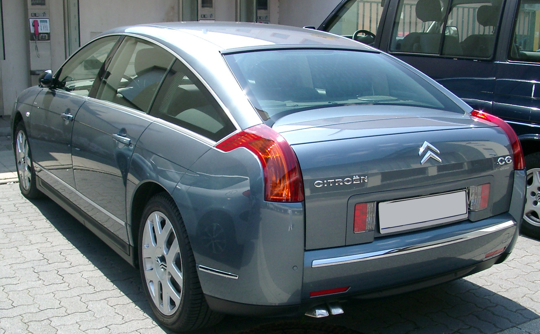 Citroen C6